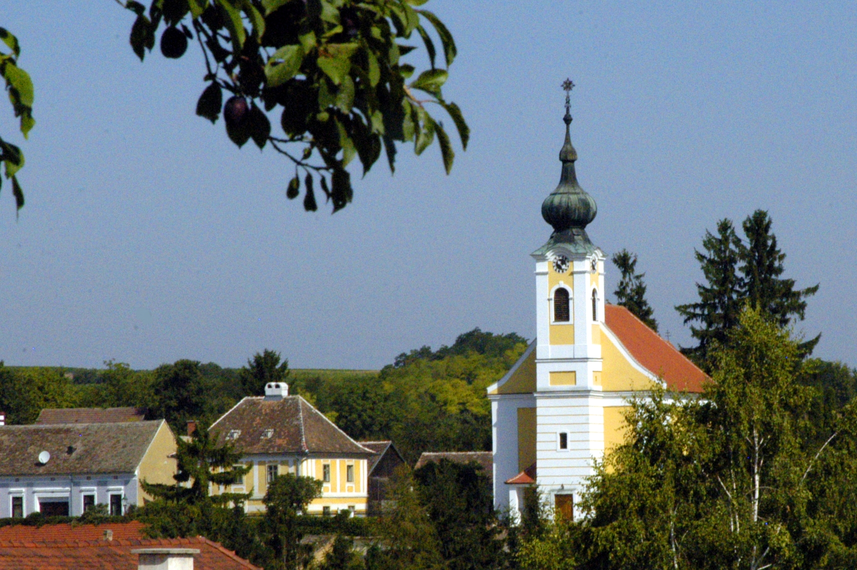 Pfarrkirche zur Heiligen Dreifaltigkeit in Großmeiseldorf, Gemeinde Ziersdorf